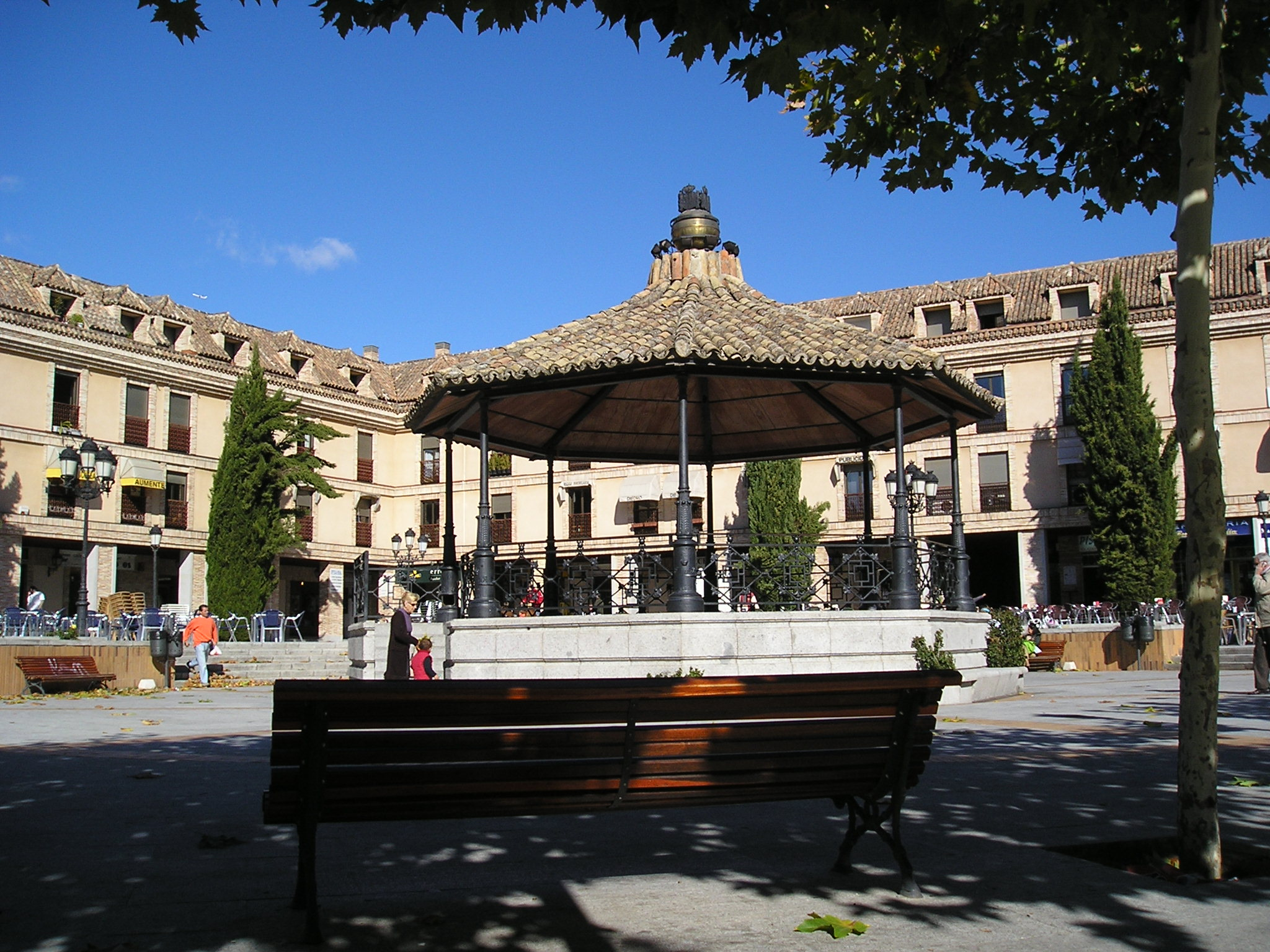 Plaza de España de Las Rozas de Madrid, foto obtenida por Santiago Agueda Alonso para la wikipedia de España